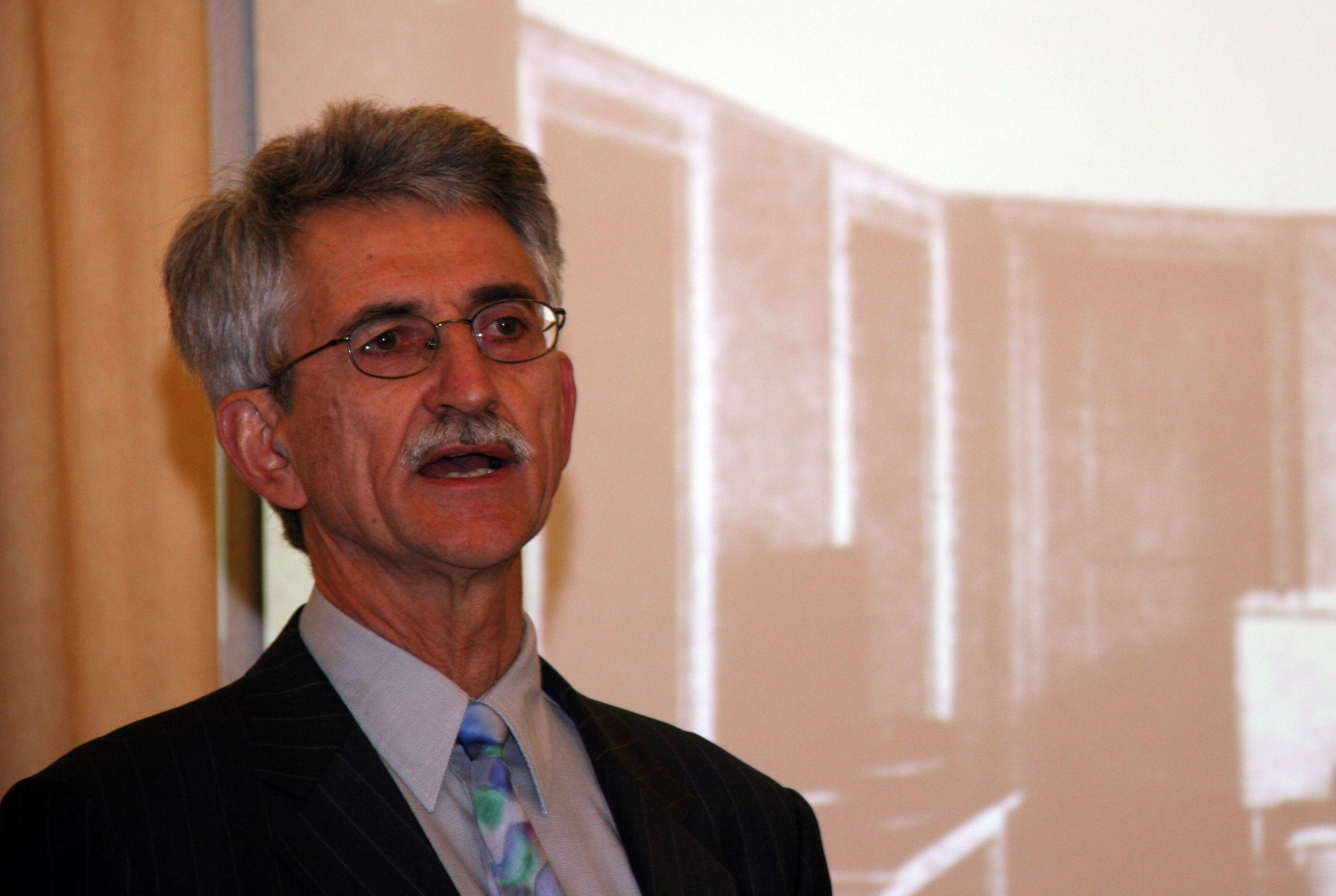 Prof. Dr. Jürgen Schlumbohm bei einem Vortrag zur Geburtshilfe um 1900 in Fürth/ Bay., Oktober 2009